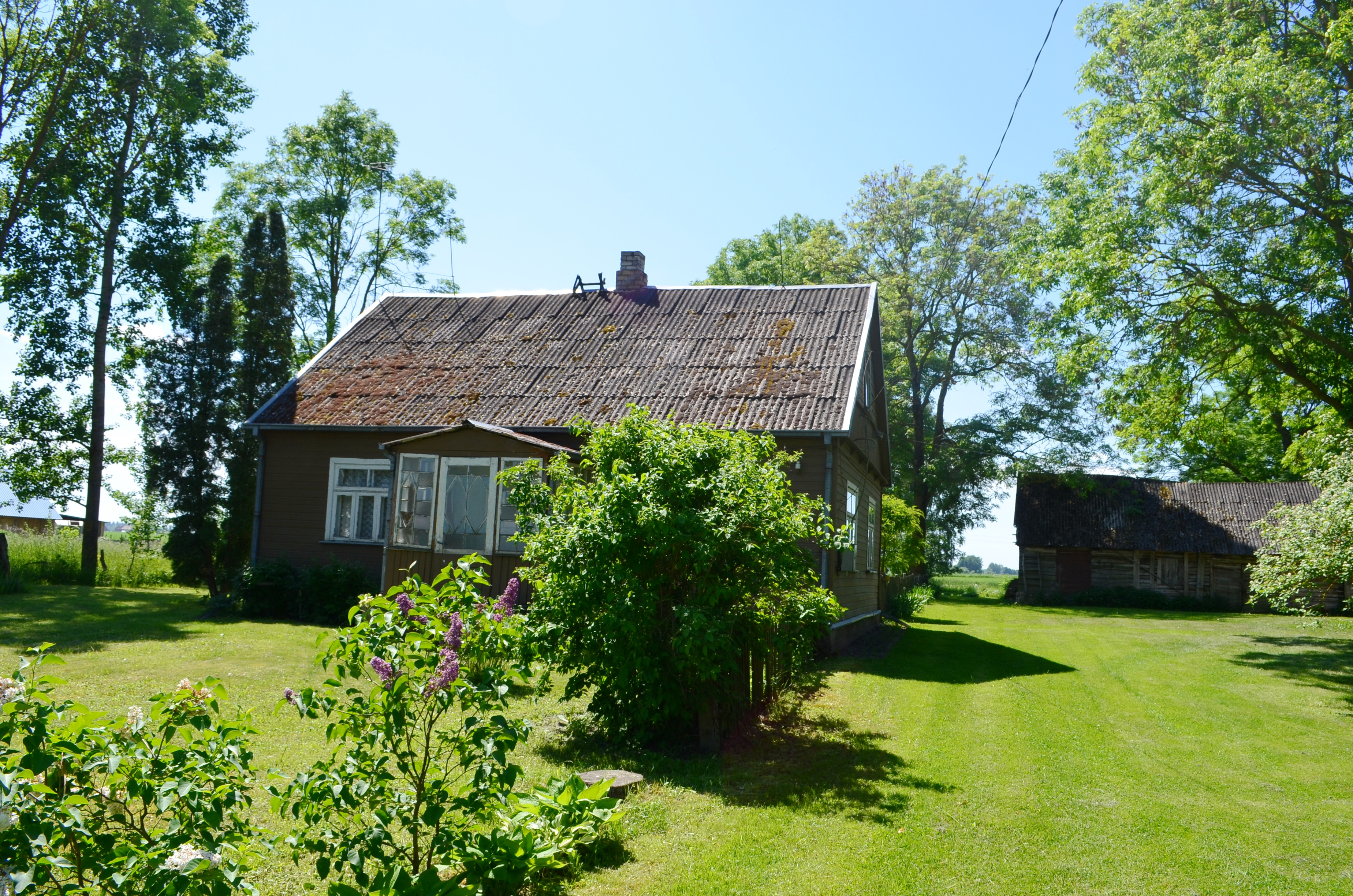 Jono Avyžiaus gimtoji sodyba, Mėdginai, Joniškio raj.